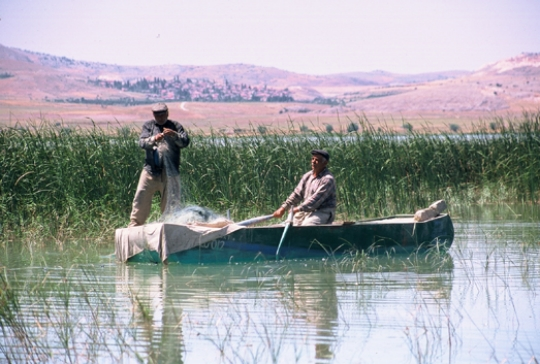 Karataş'tan Bademli